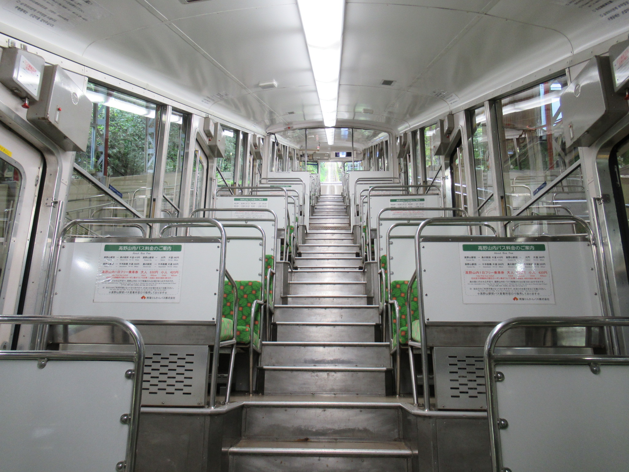 南海電鉄 コ21車内